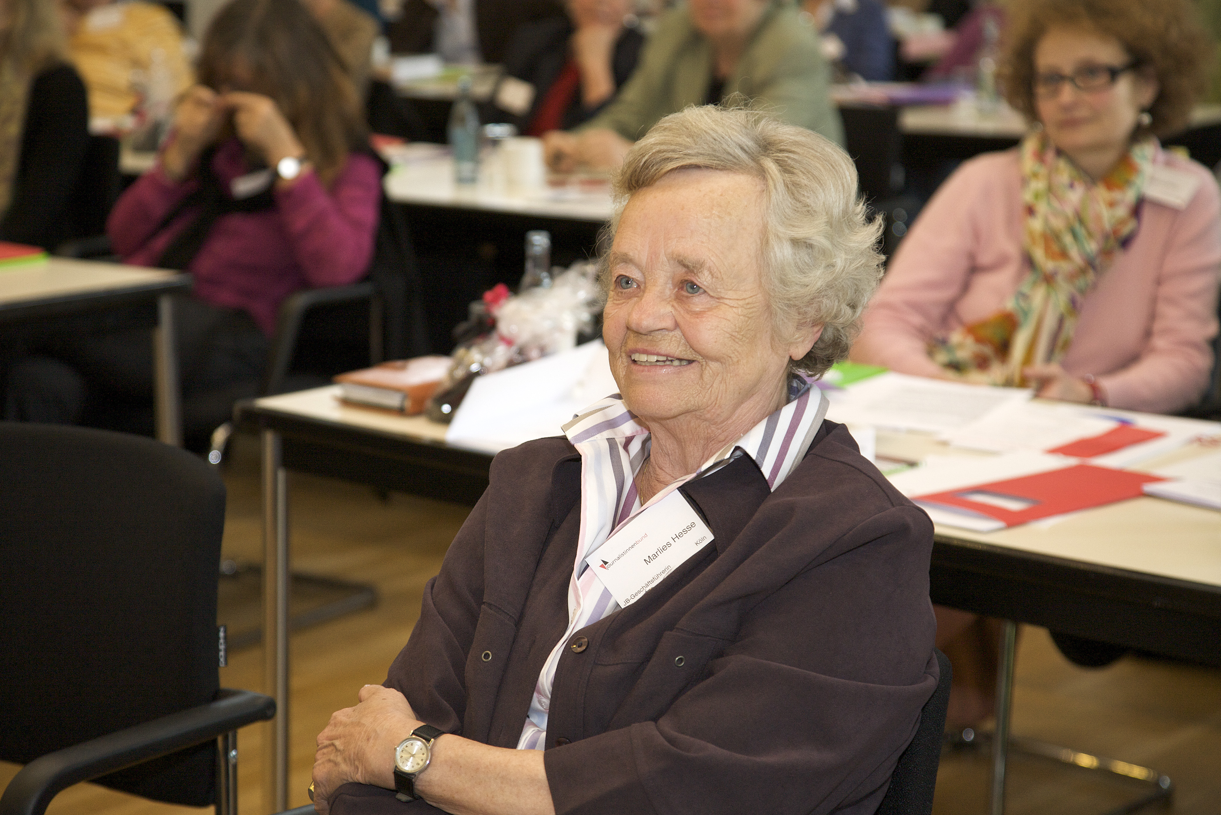 Marlies Hesse sitzend